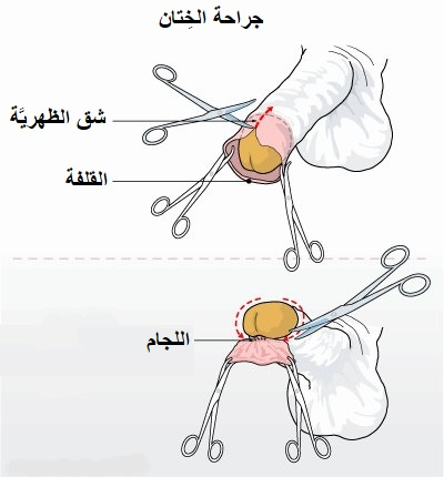 رسمٌ يوضح كيفيَّة إجراء جراحة الخِتان.